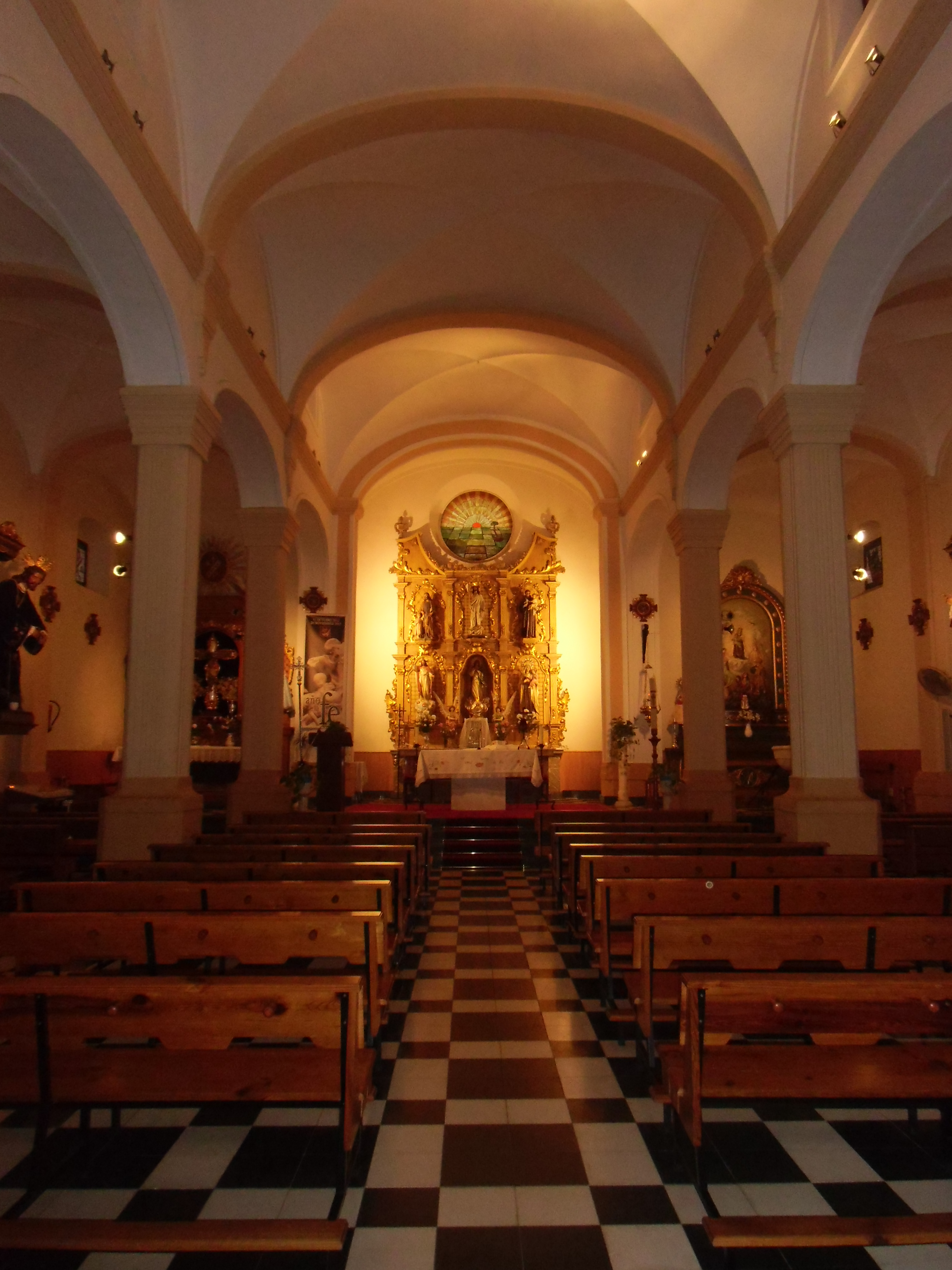 Interior de la Iglesia de la Purísima Concepción.